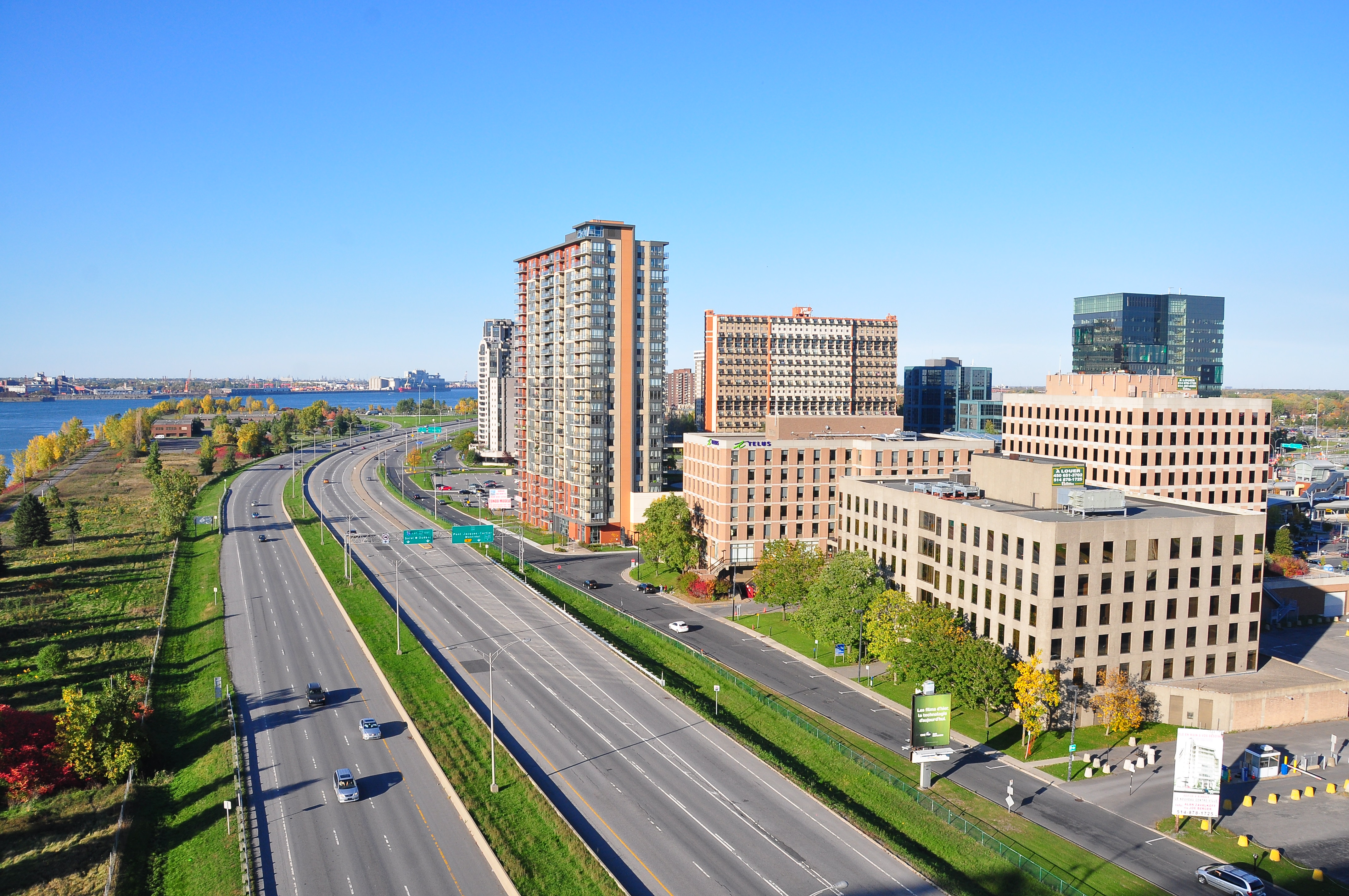 Longueuil